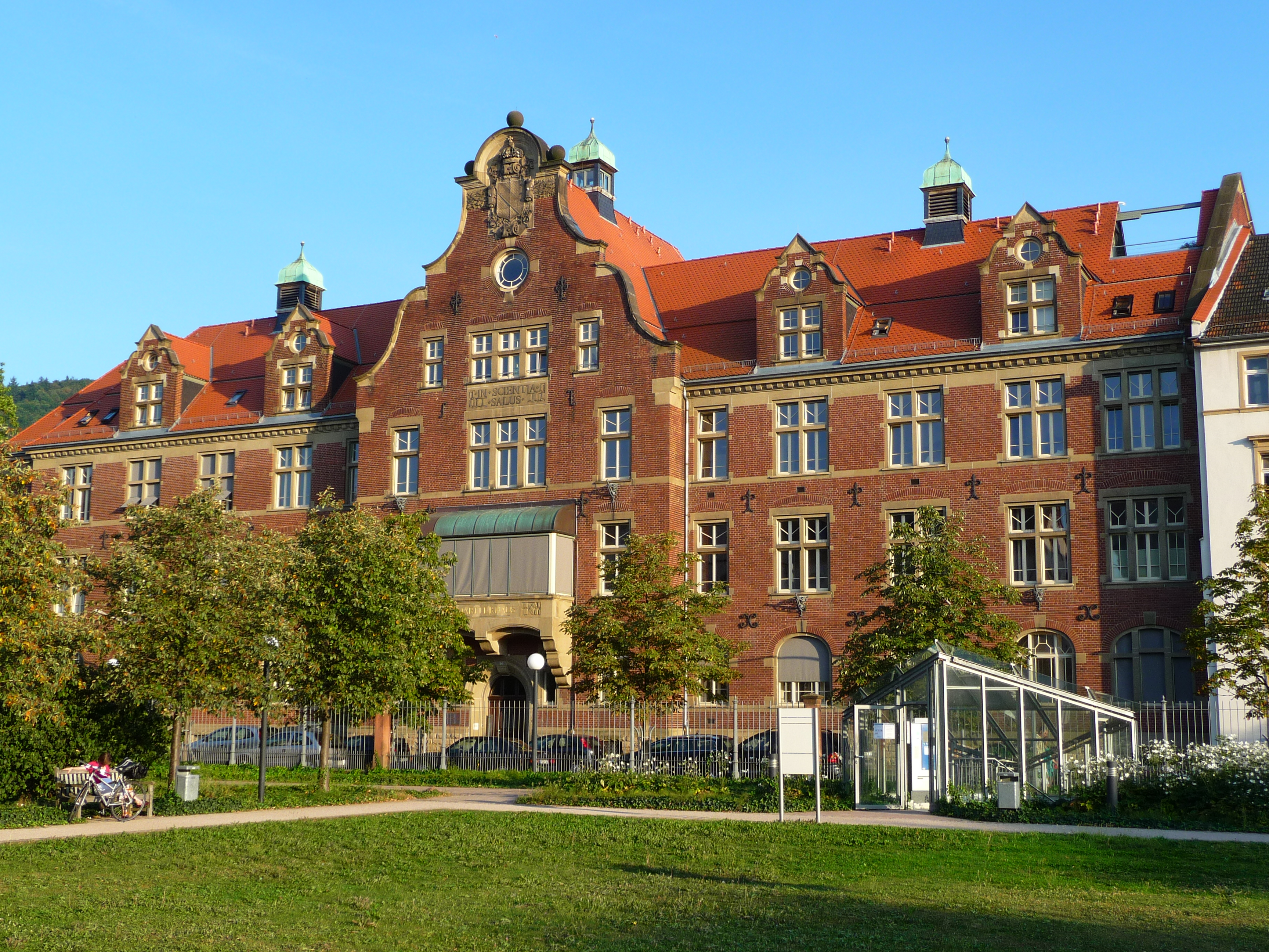 Samariterhaus im Bereich des Altklinikums im Heidelberger Stadtteil Bergheim (Deutschland)